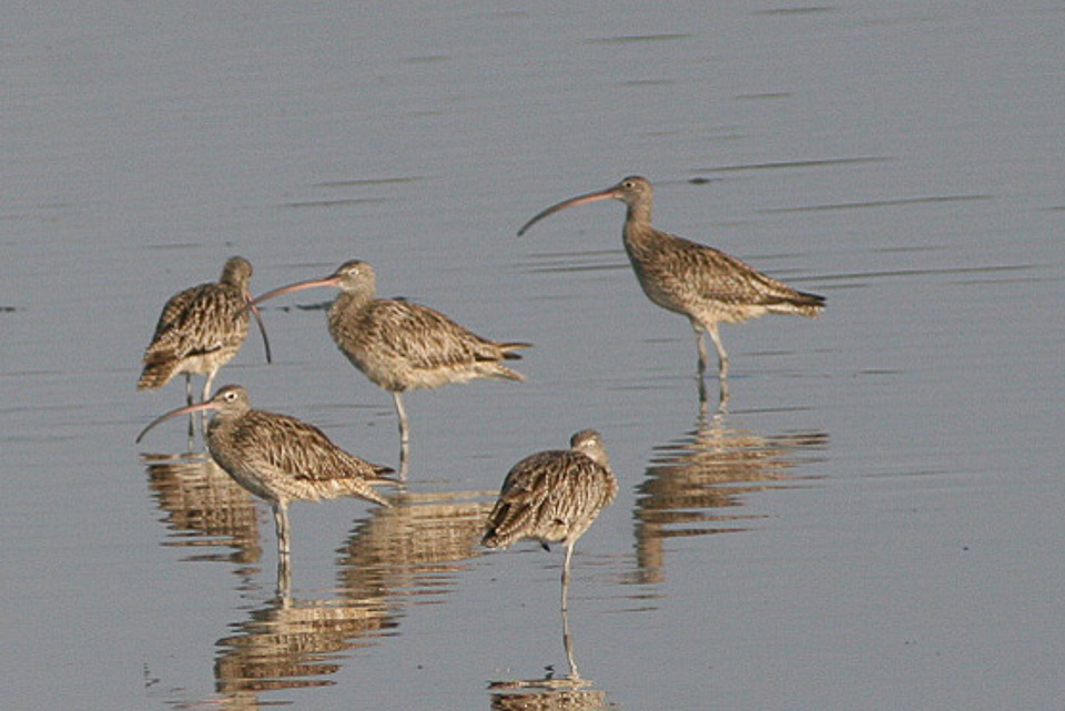 Far-eastern Curlew Numenius madagascariensis, Java, Indonesia